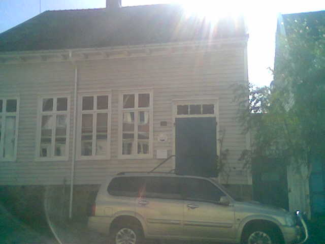 Hammersmarks bedehus i Gyldenløvesgt 70